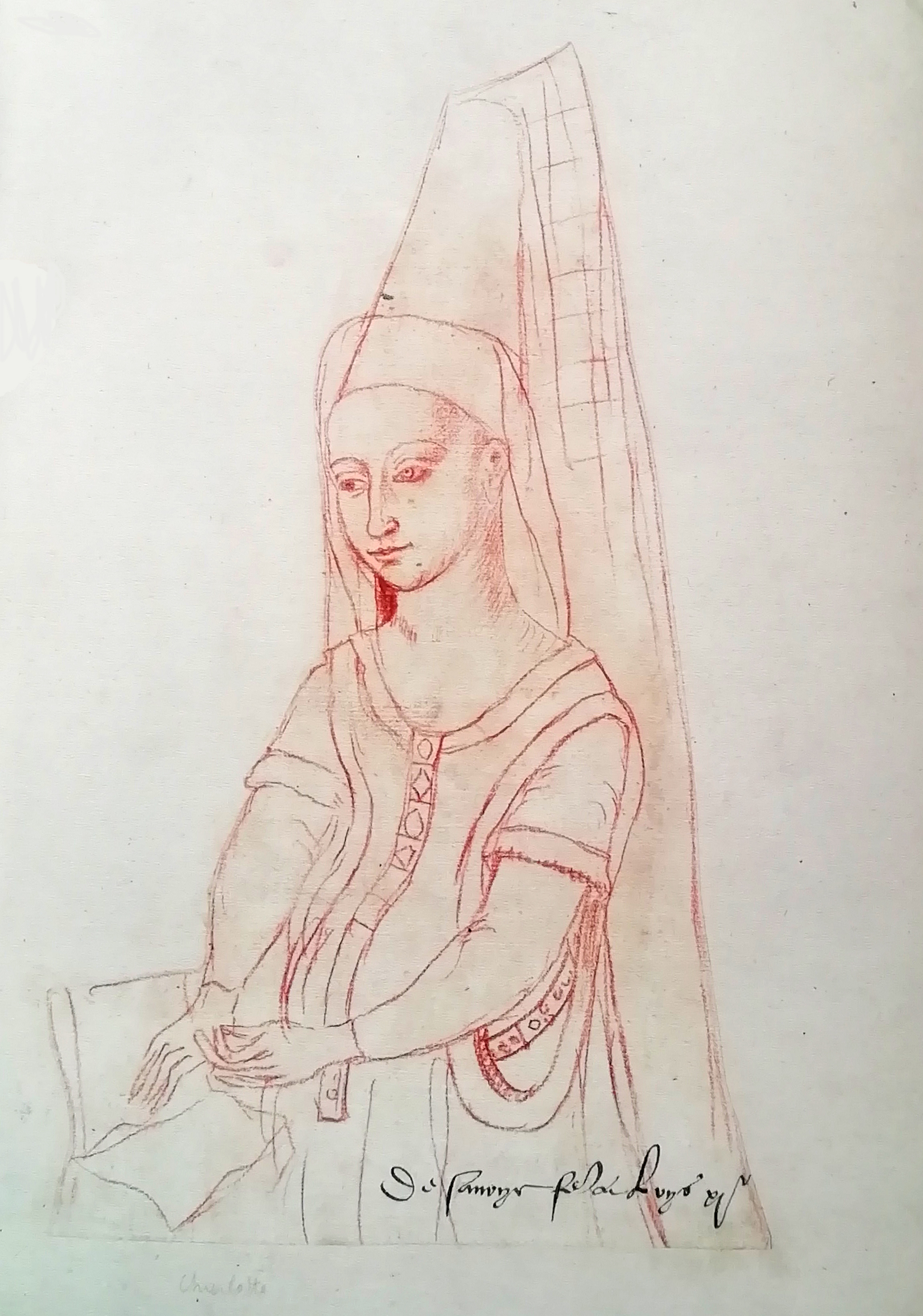 Portrait (d'après une peinture disparue) à la sanguine sur pierre noire de Marguerite d'Écosse (1424-1445), Recueil d'Arras, folio 8, Bibliothèque municipale d'Arras. Une inscription sur le dessin identifie erronément le modèle avec Charlotte de Savoie, seconde épouse du roi Louis XI.